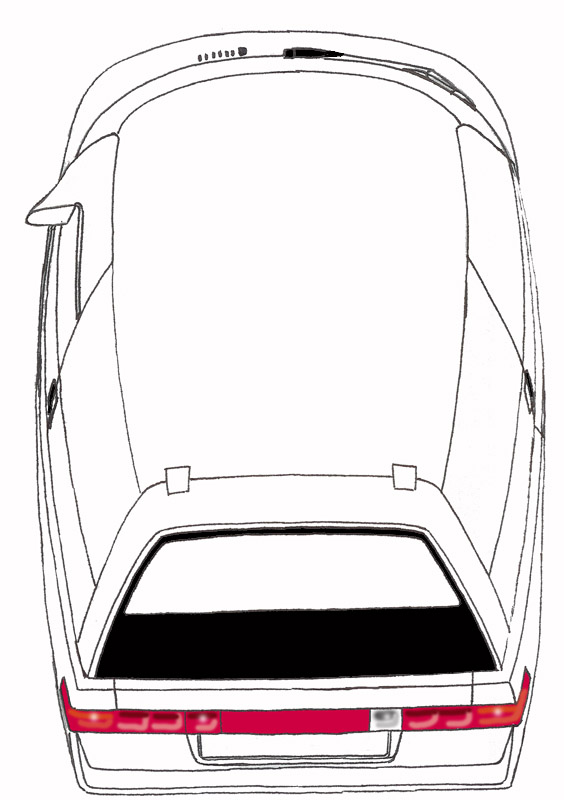 dessin personnel d'un prototype Renault Vesta II licence copyleft GFLD et CC-BY-SA